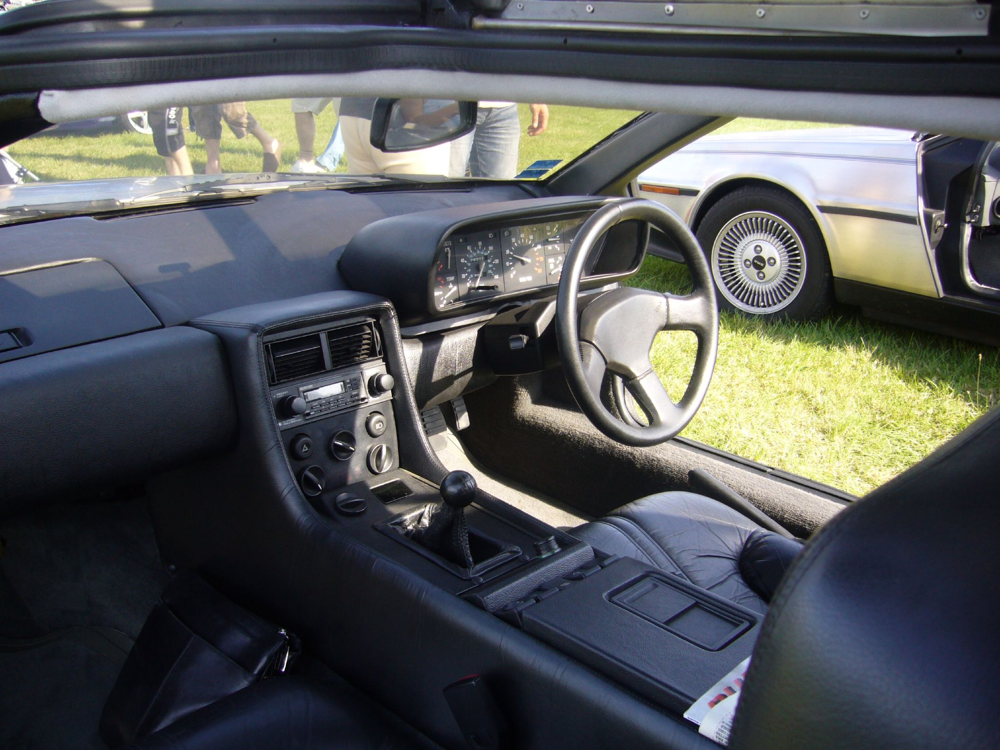 De Lorean DMC12